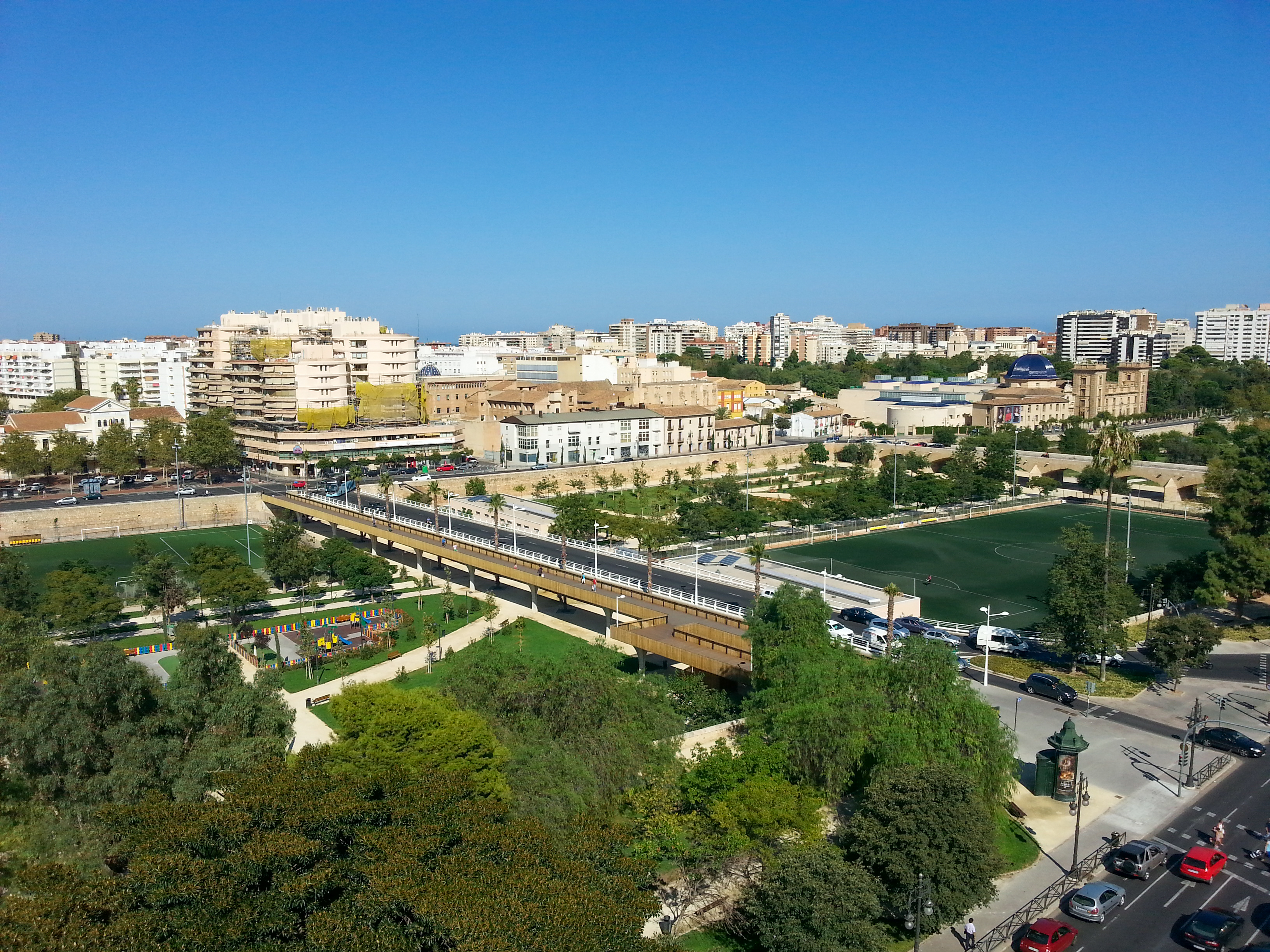 Vista del pont de Fusta des de les torres de Serrans.